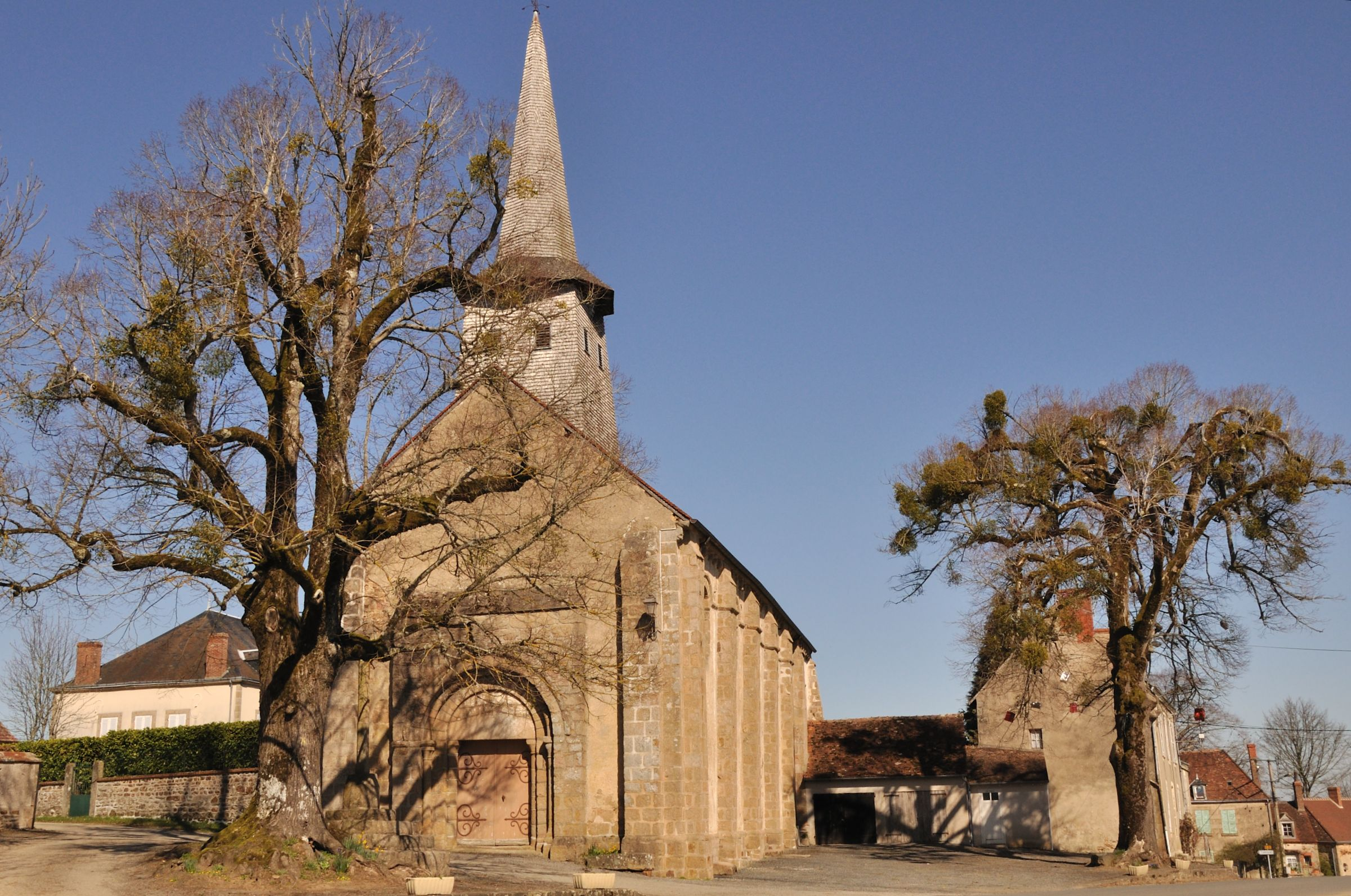 Eglise de Nouziers (Creuse)